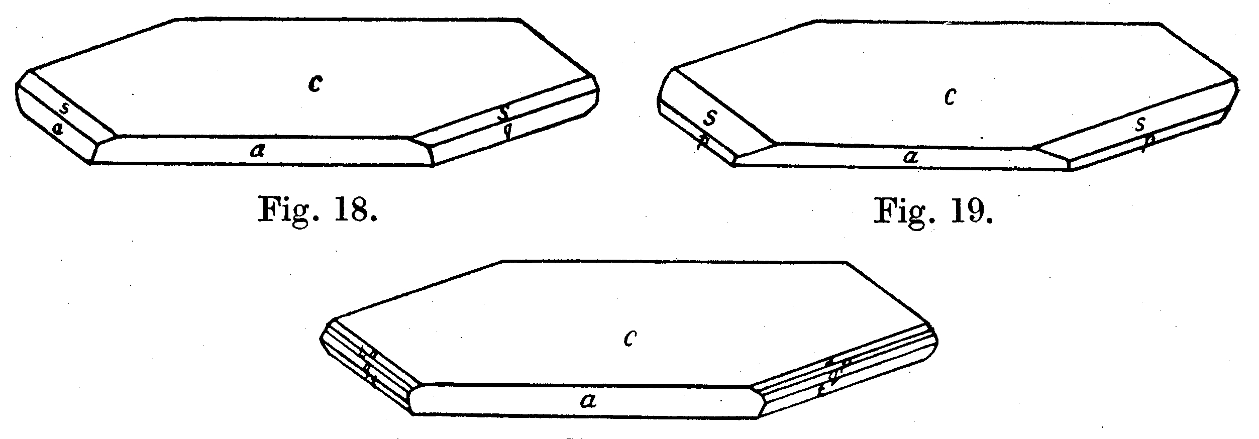 Semseyit